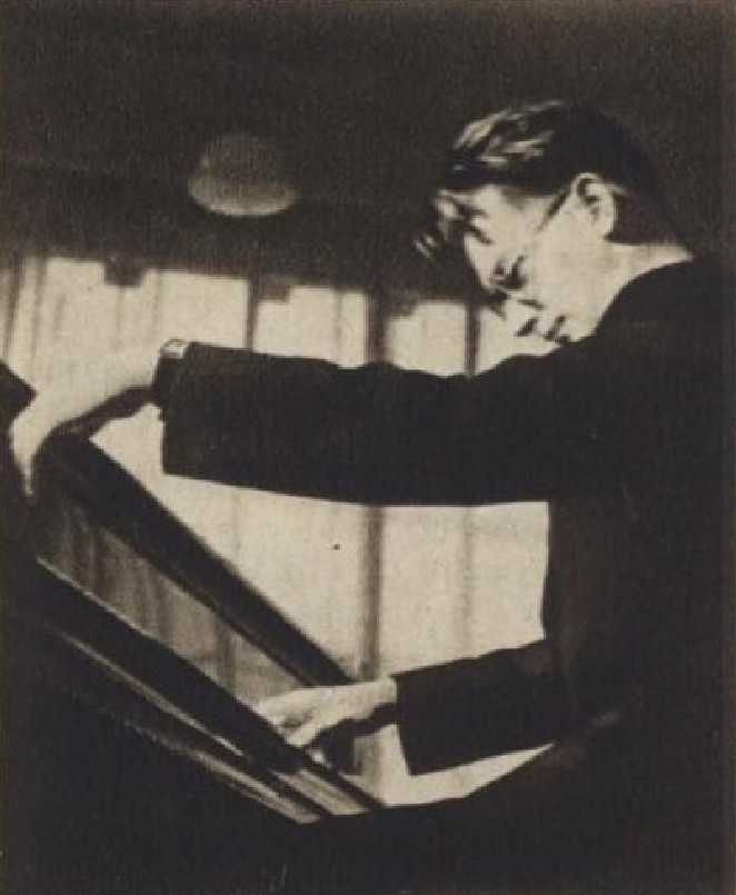 František Rauch (1910-1996), český pianista a pedagog